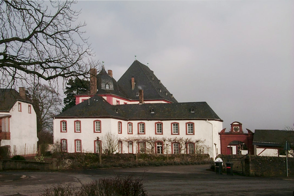 Schloss Bekond barockes Landschloss, Hauptbau 1710, Seitenflügel 1769/72, Ökonomie 1713, Orangerie 1732